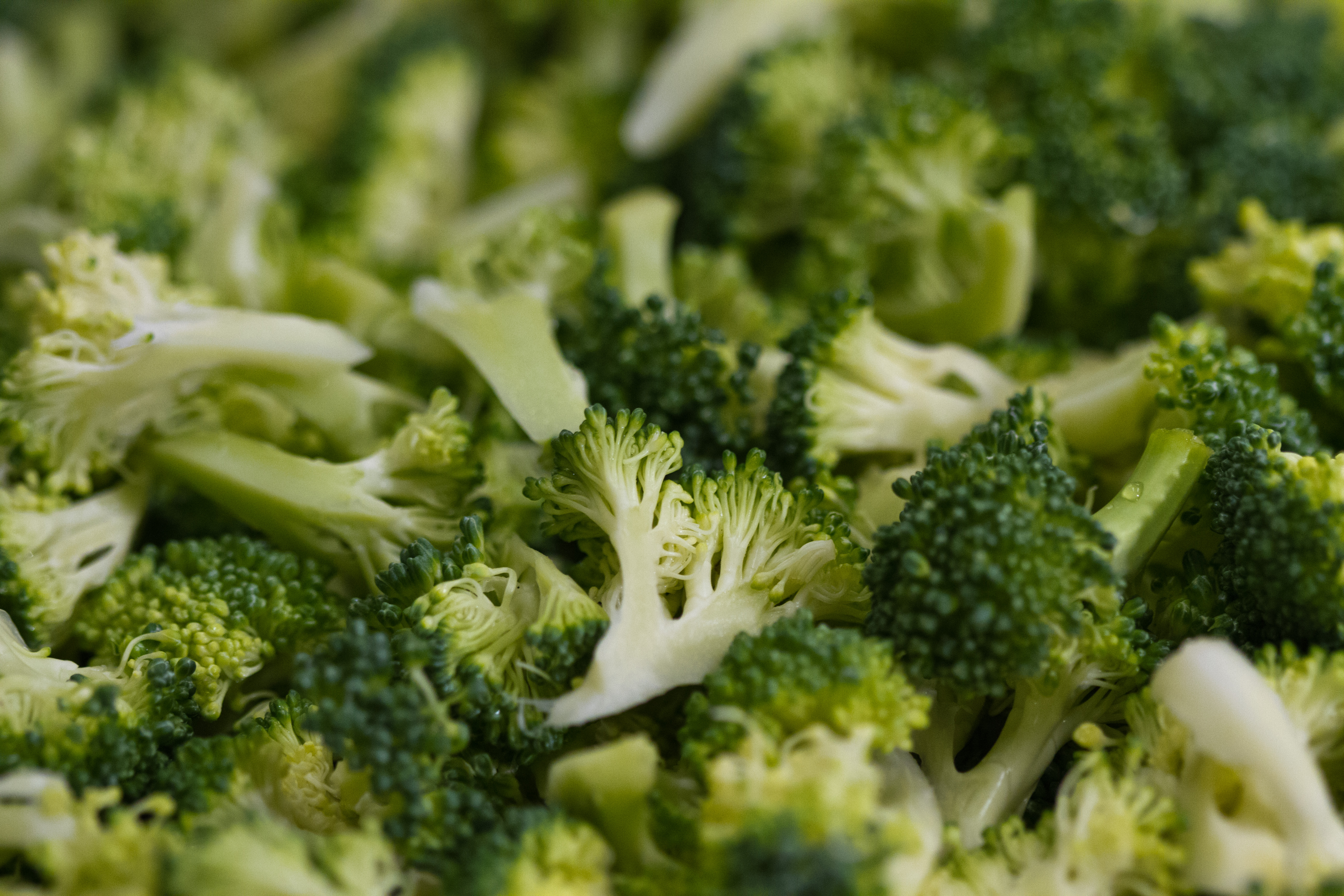 Brassica oleracea var. italica - broccoli